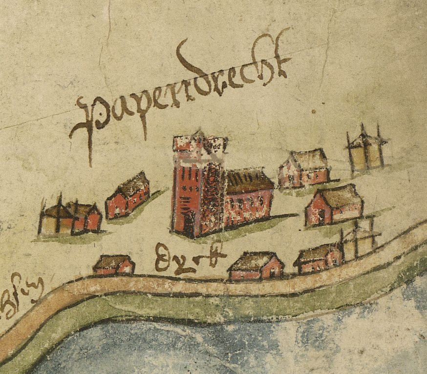 Detail van kaart uit 1615 met Papendrecht